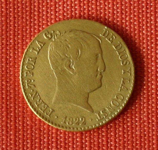 Goldmünze über 80 Reales von Fernando VII aus 1822